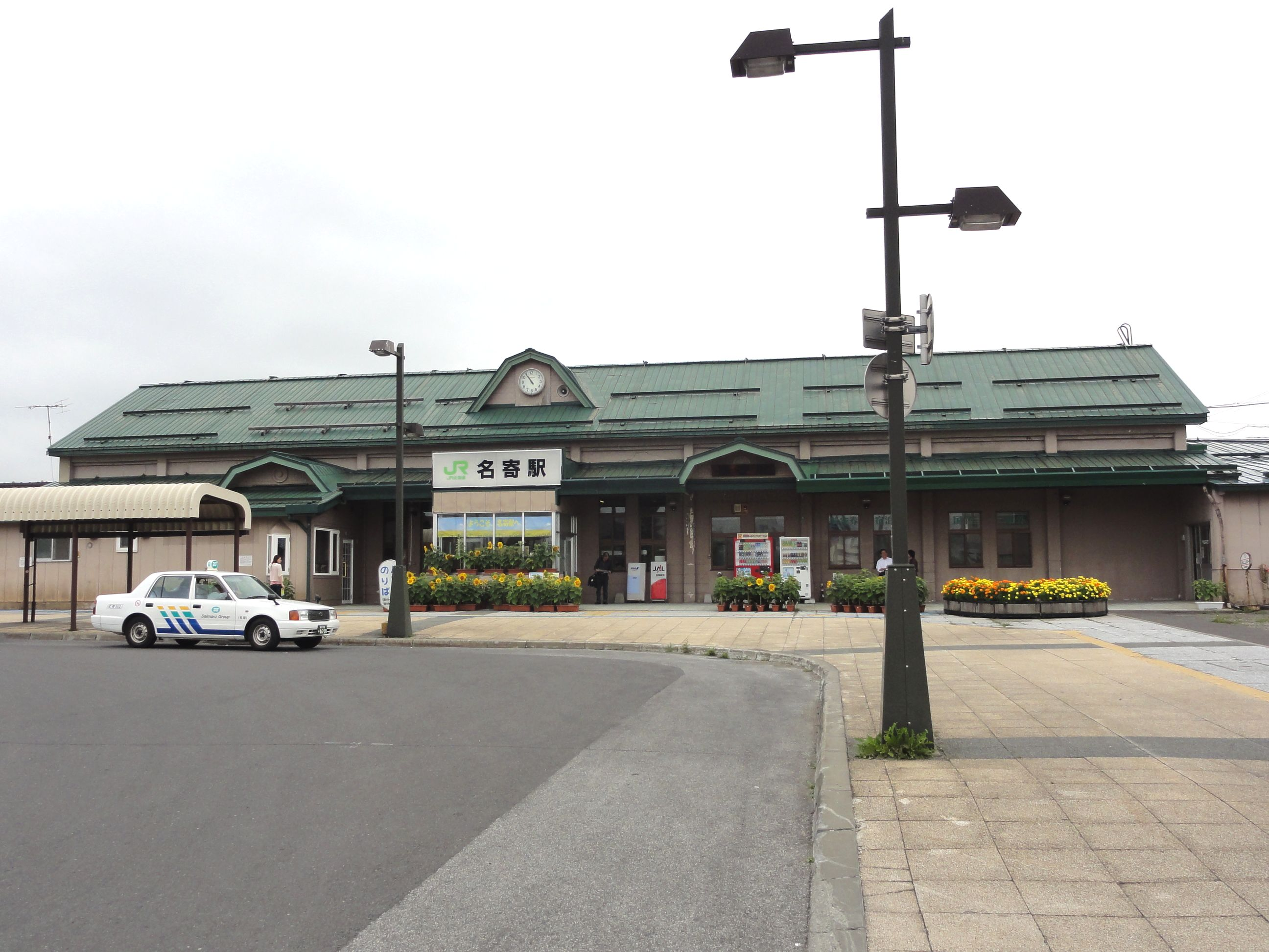 名寄駅